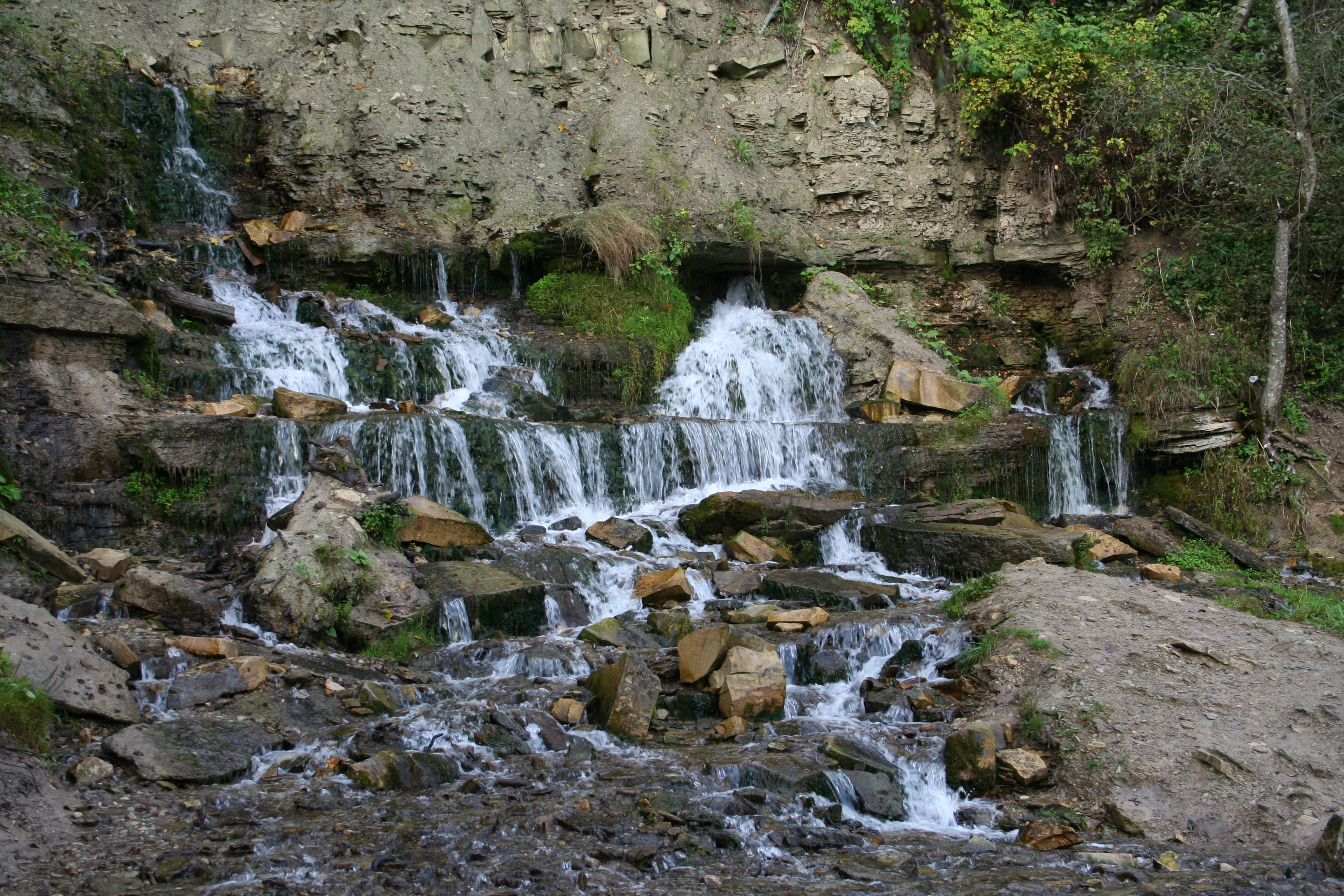 Словенские ключи недалеко от Изборска